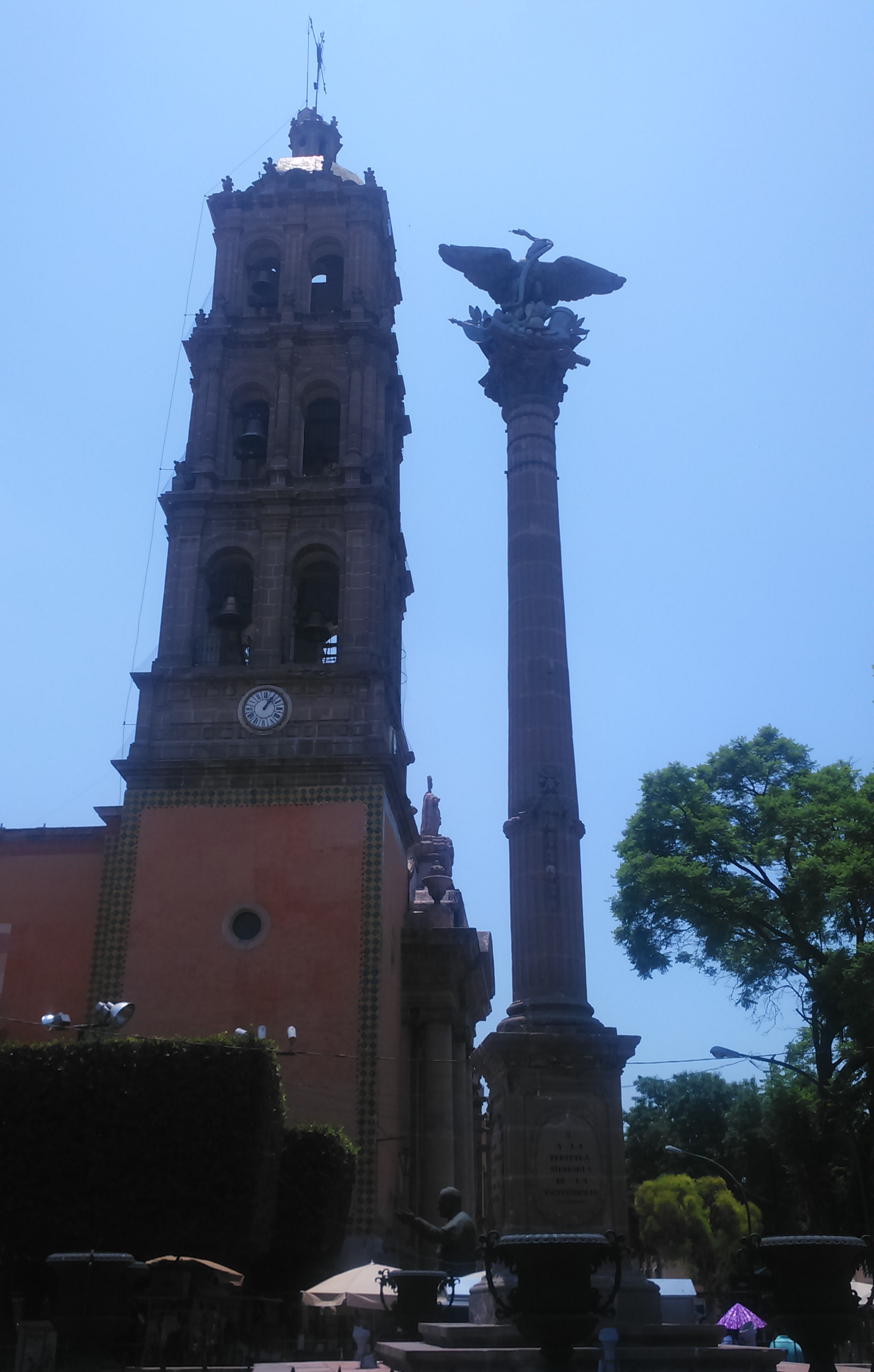 Monumento a la Independencia, obra de Francisco Eduardo Tresguerras; el primero de su tipo en México. Al fondo la torre del templo de San Francisco.